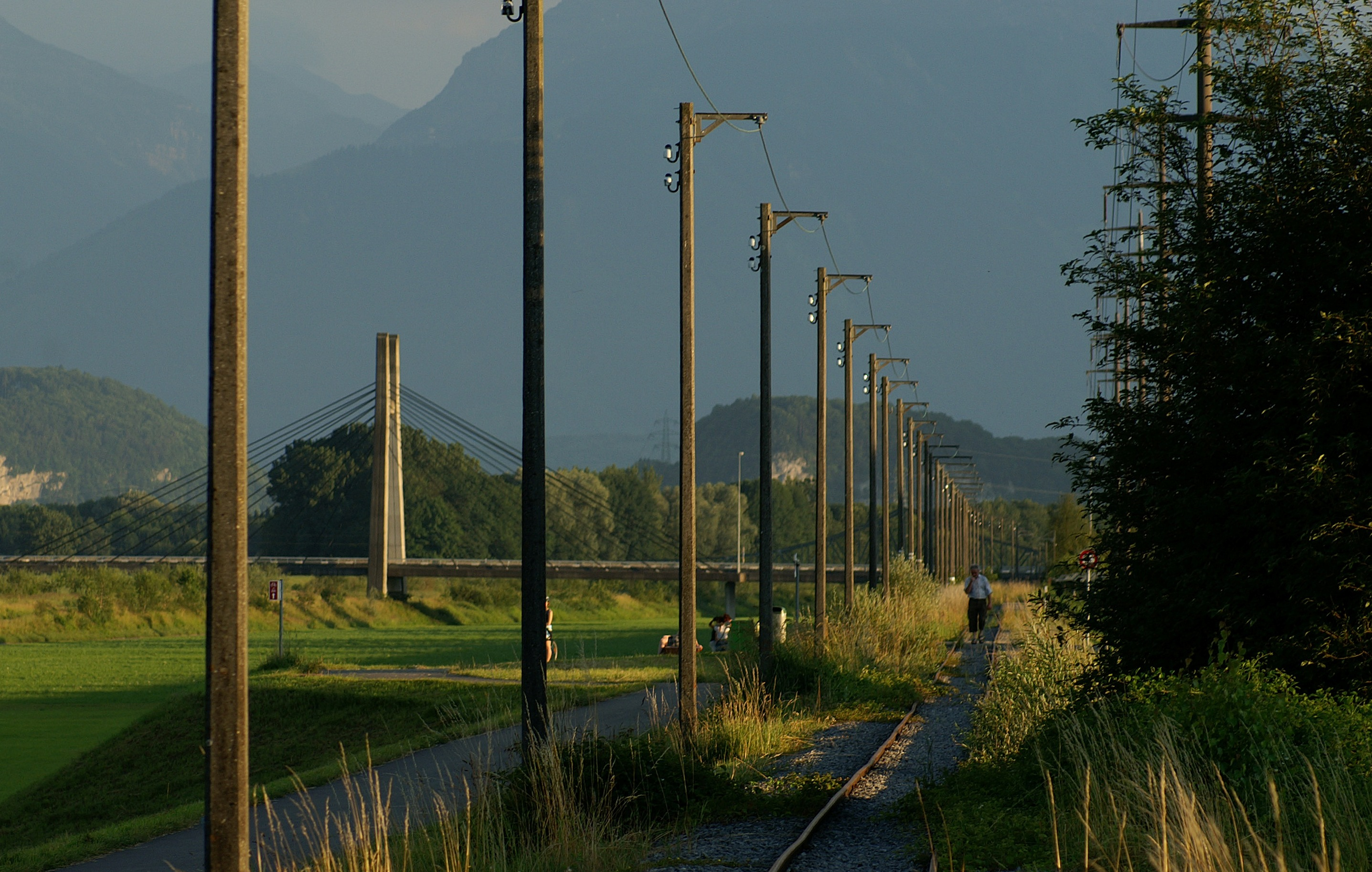 Streckenabschnitt der Bahn der internationalen Rheinregulierung (IRR) auf der schweizerischen Seite zwischen Widnau und Diepoldsau.